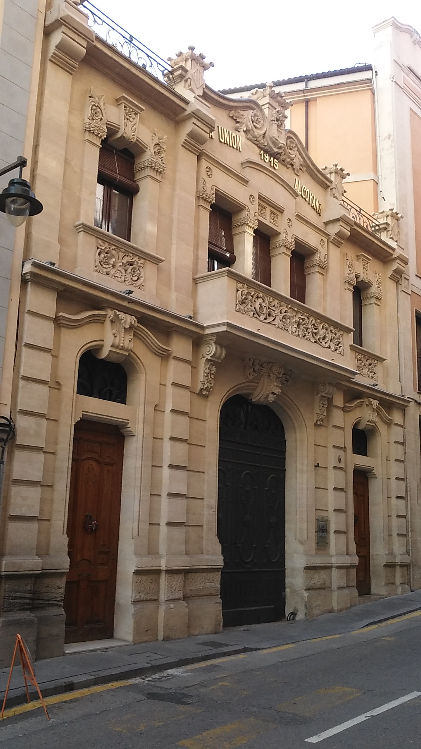 Parc de bombers en Alcoy (Alacant). Edifici moderniste.